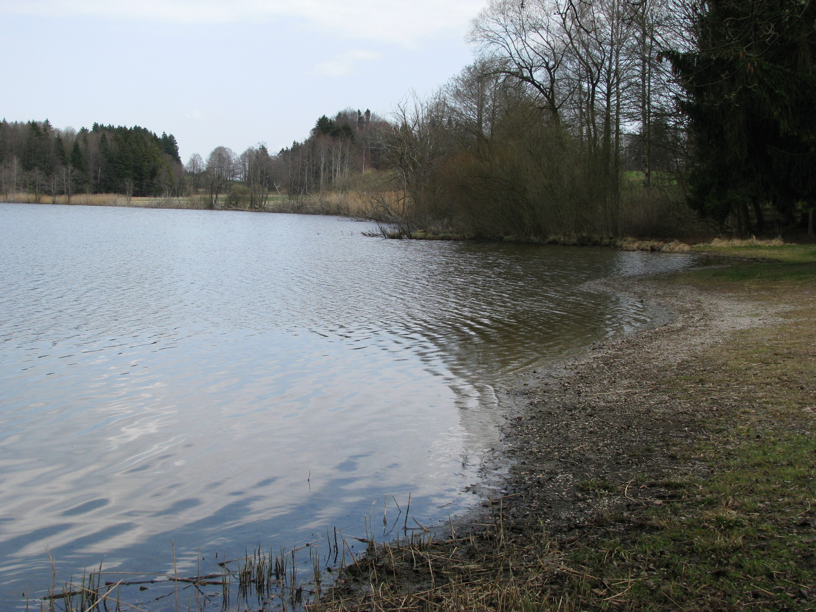 Lugenausee, Badeplatz und Südufer